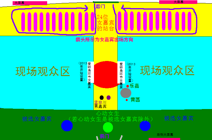 非诚勿扰节目现场示意图